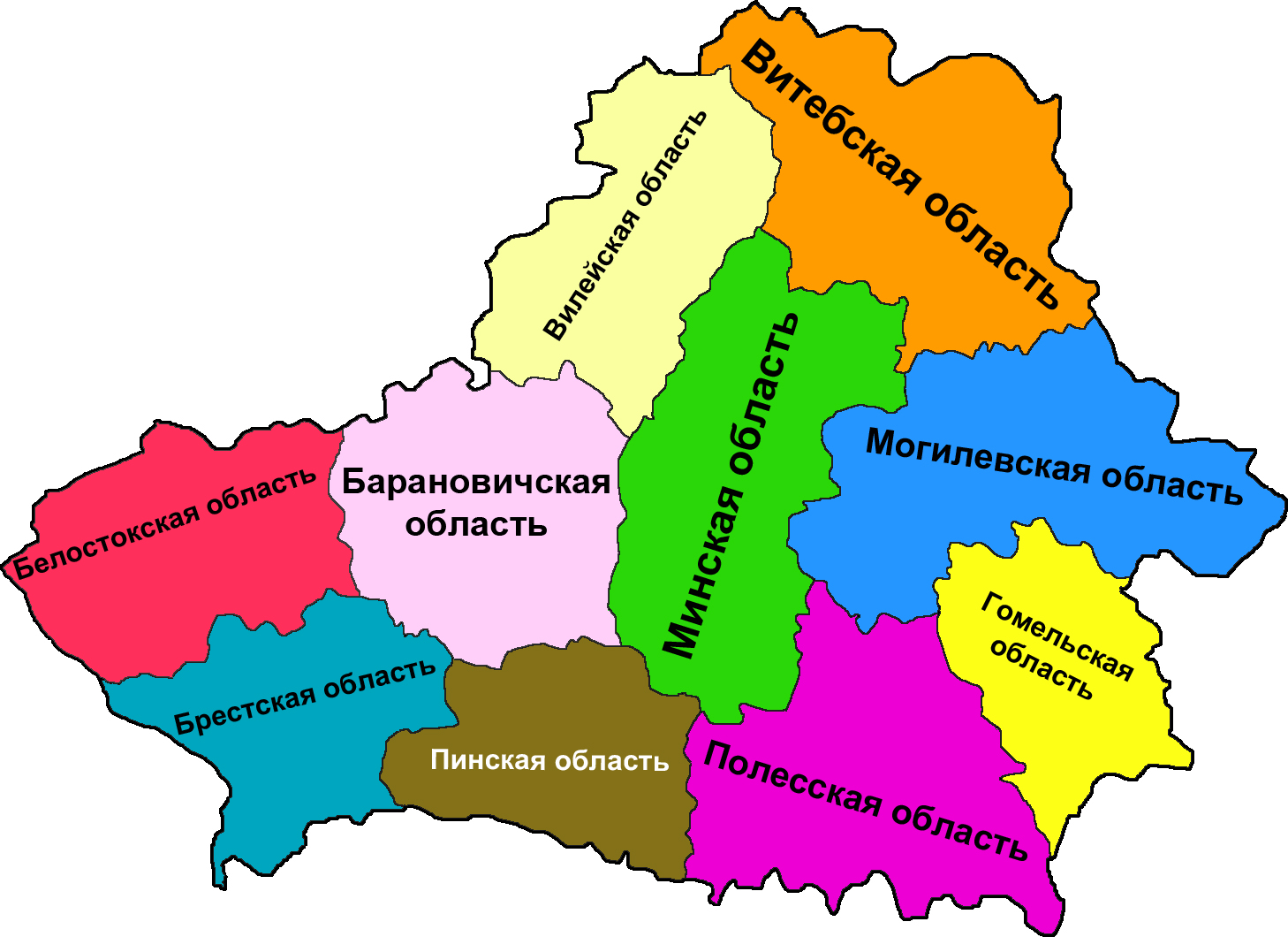 Белорусская ССР на 1 марта 1940 г